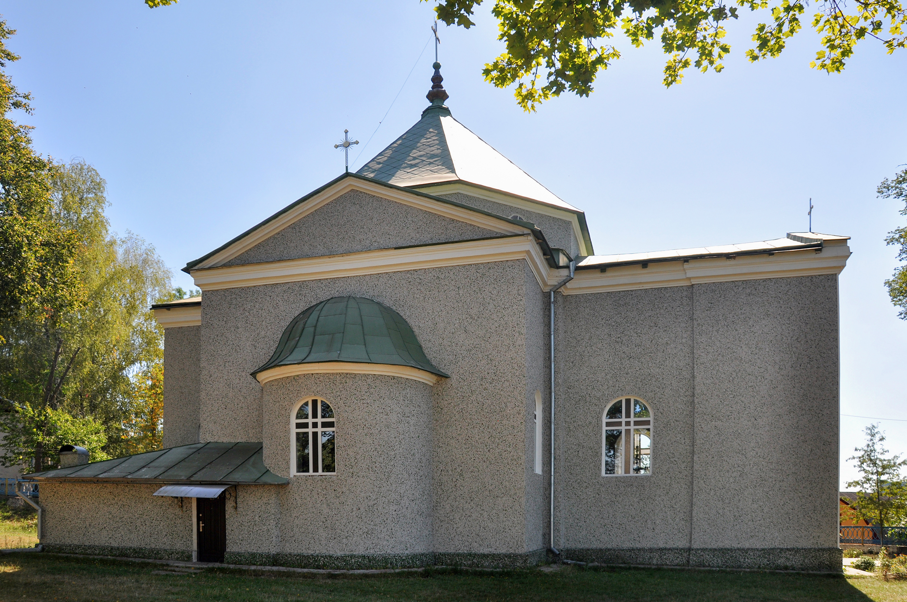 Церква Покрови (мур.), село Порохова